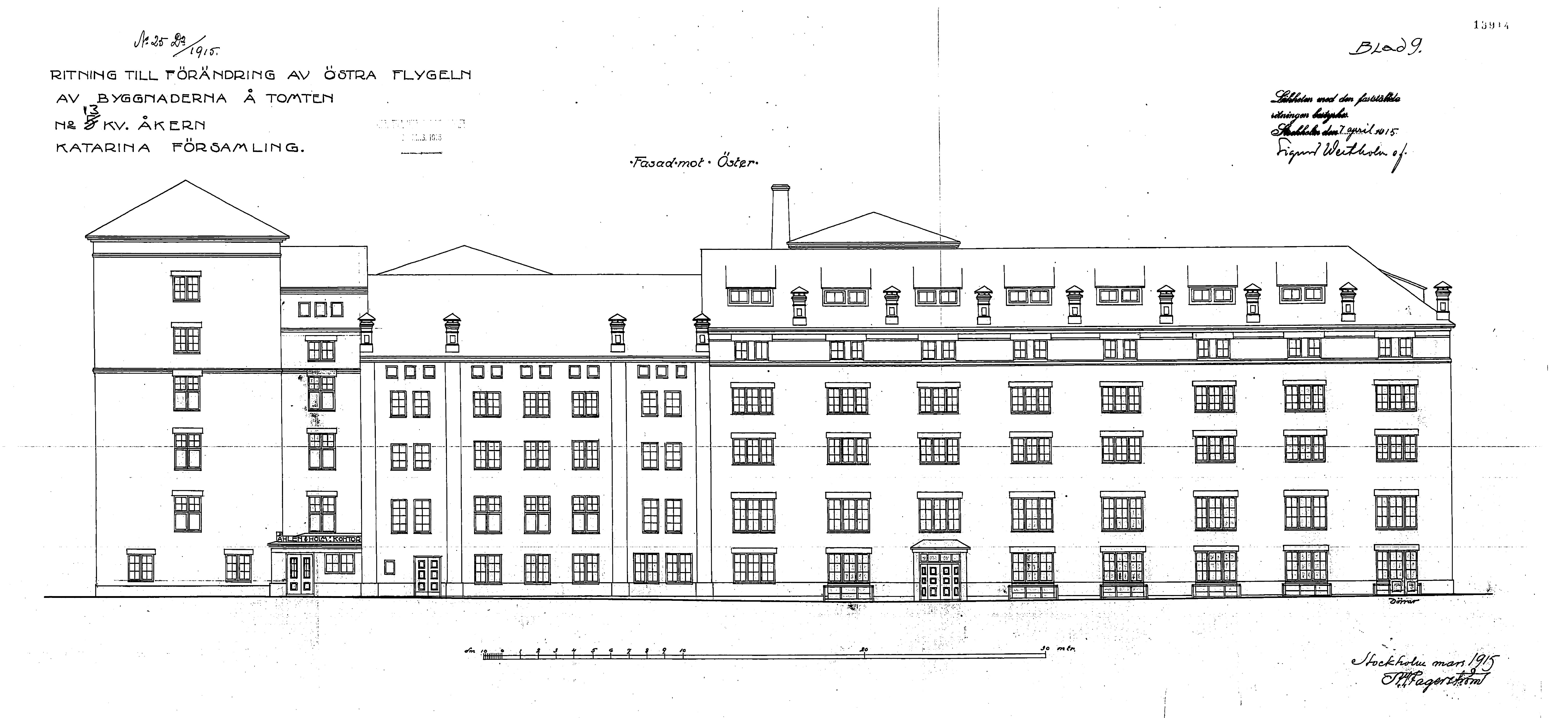 Fasadritning för Åhlén & Holm, Södermalm, arkitekt Victor Fagerström